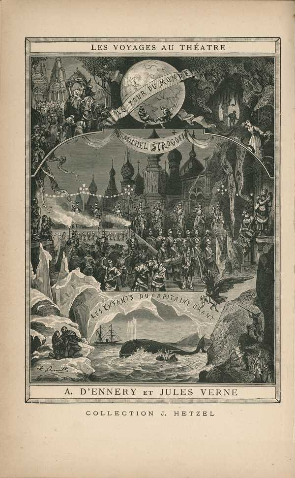 Frontispice Vernovy knihy cesty na divadle z roku 1881